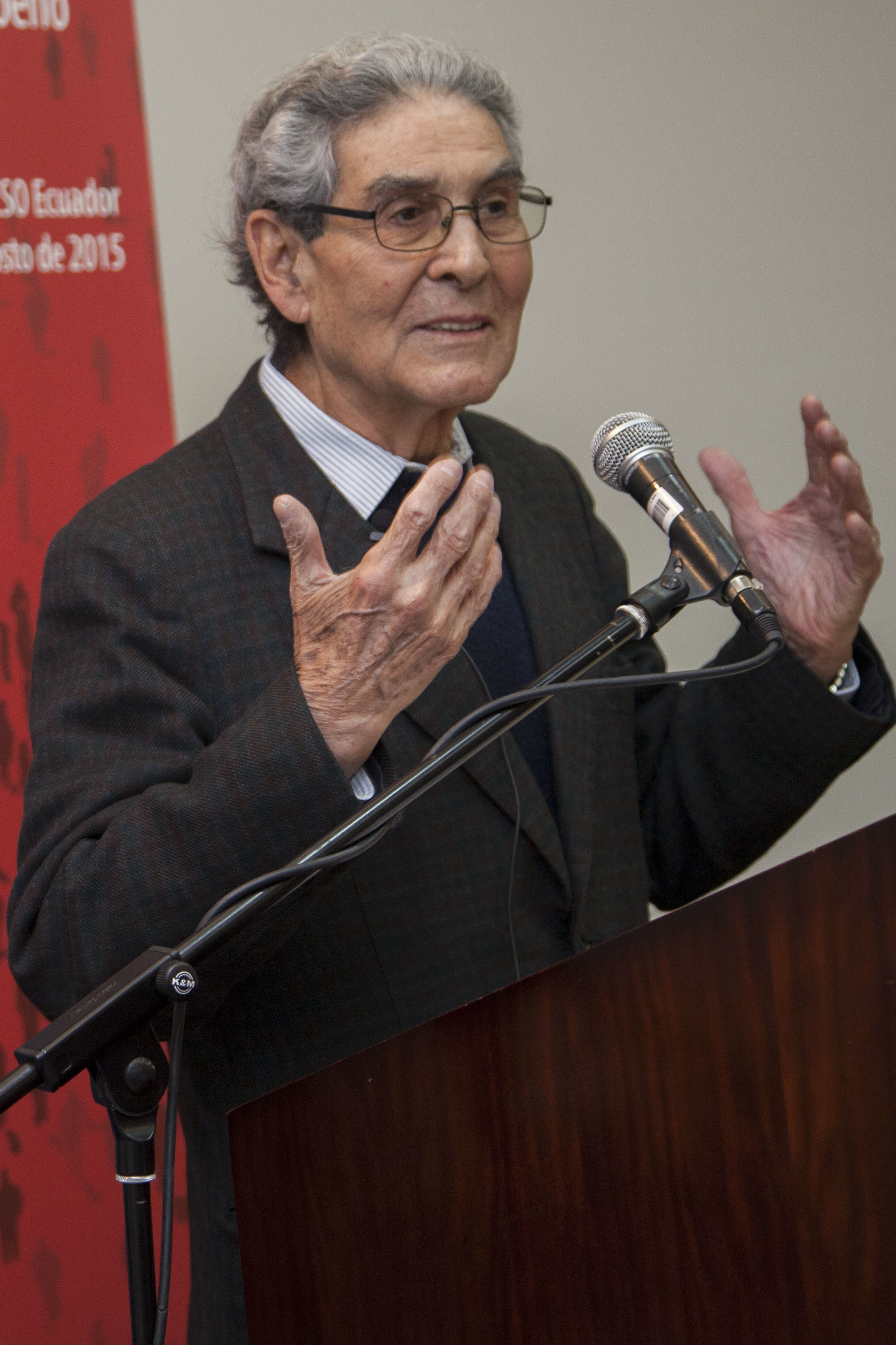 Quito, Ecuador. 25 de agosto de 2015. El Canciller Subrogante, Xavier Lasso inaugura el III Congreso Latinoamericano y Caribeño de Ciencias Sociales, que se realiza en Quito en las instalaciones de FLACSO Ecuador, como parte de la evento se destaca la ponencia magistral del Sociólogo Peruano, Aníbal Quijano. Carlos Pozo / Cancillería Ecuador